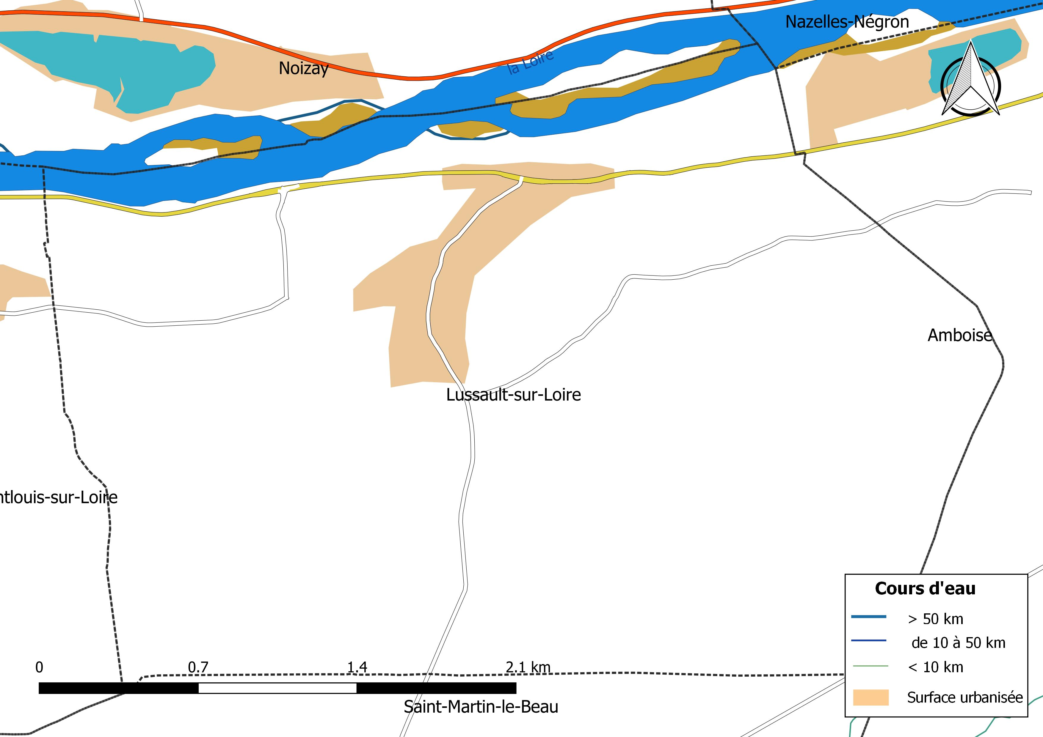 Carte du réseau hydrographique de la commune de Lussault-sur-Loire (France).